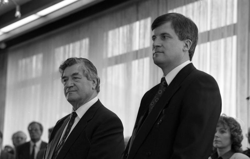 Im Rahmen einer Kabinettsumbildung wurde der CSU-Bundesabgeordnete Horst Seehofer (r.) am 21. April 1989 zum neuen Parlamentarischen Staatssekretär beim Bundesminister für Arbeit und Sozialordnung ernannt. Er wurde Nachfolger des Parlamentarischen Staatssekretärs beim Bundesminister für Arbeit und Sozialordnung, Stefan Höpfinger.